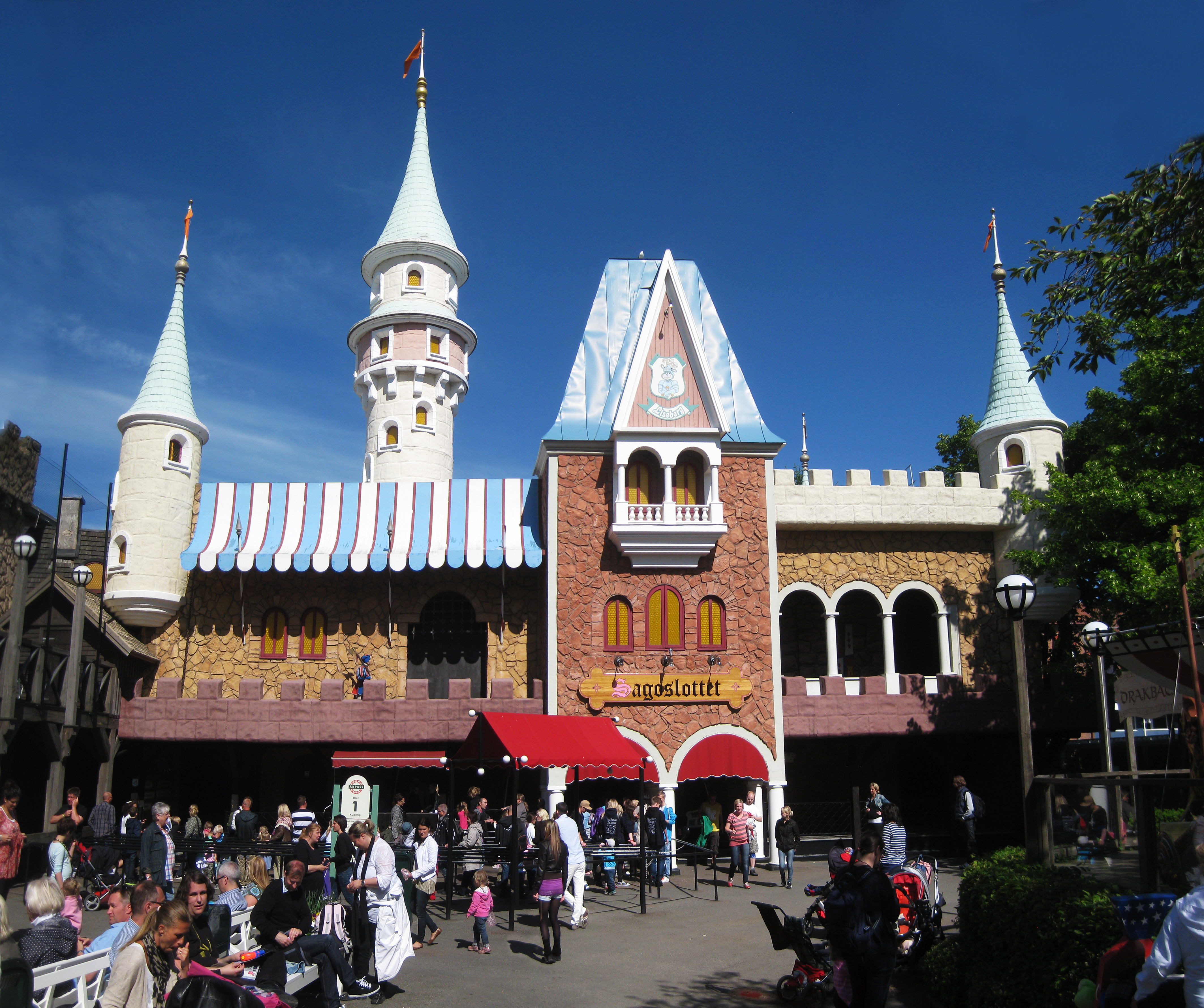 Sagoslottet, Liseberg.